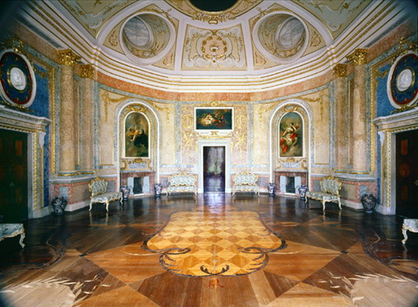 Ораниенбаум. Китайский дворец. Большой зал.